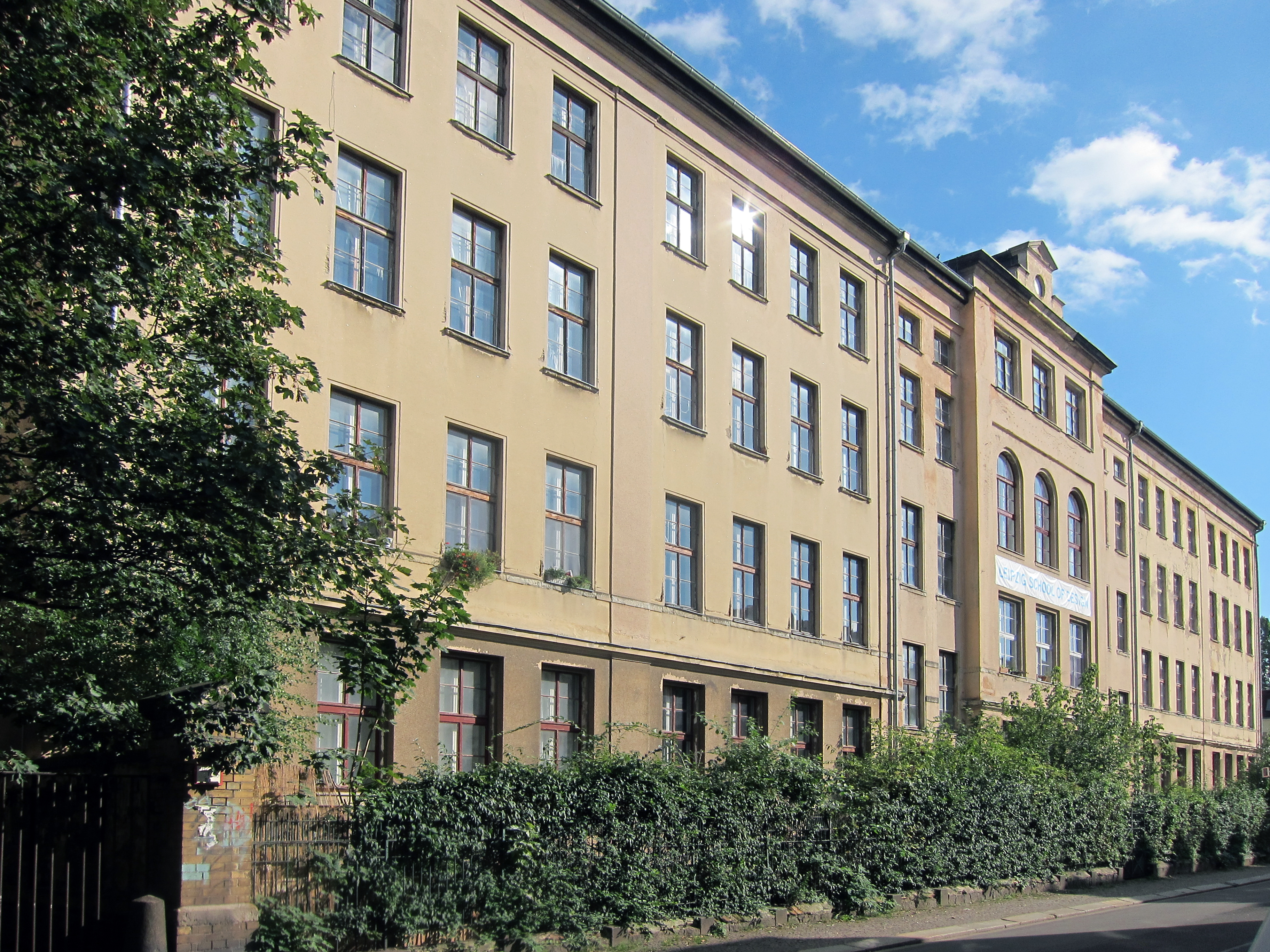 Alte Handelsschule Grosse Schule 2014, Ansicht Gießerstraße